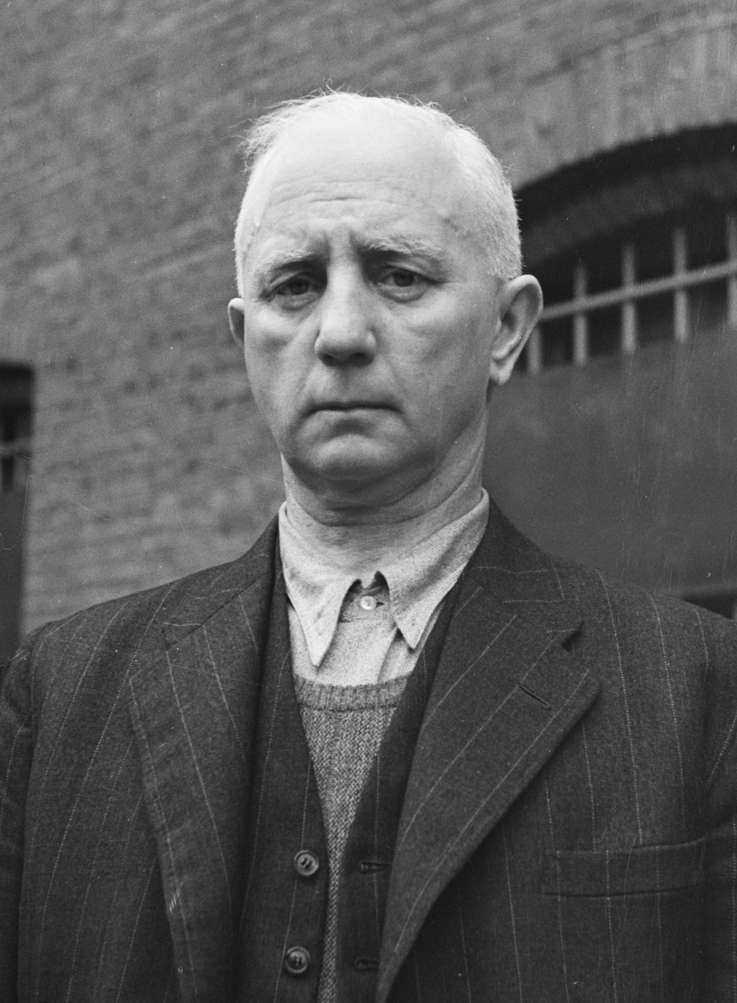 Oorlogsmisdadigers. Max Blokzijl, Scheveningen